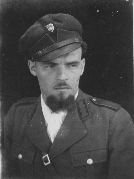 Дмитро Білінчук: Дмитро Білінчук